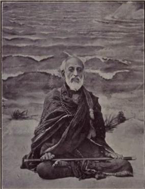 Sir S. Subramania Iyer